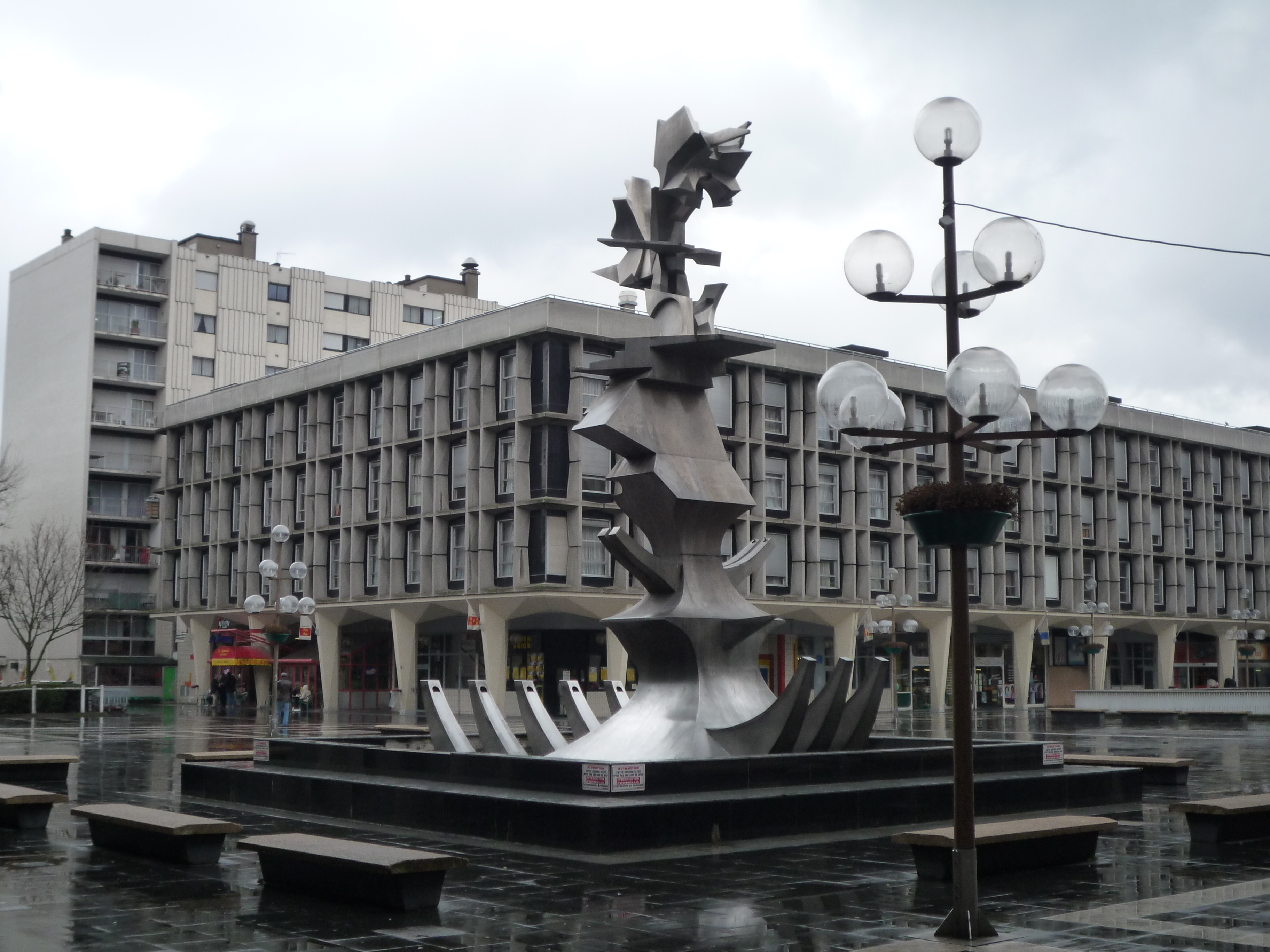 Place de France à Sarcelles en février 2009